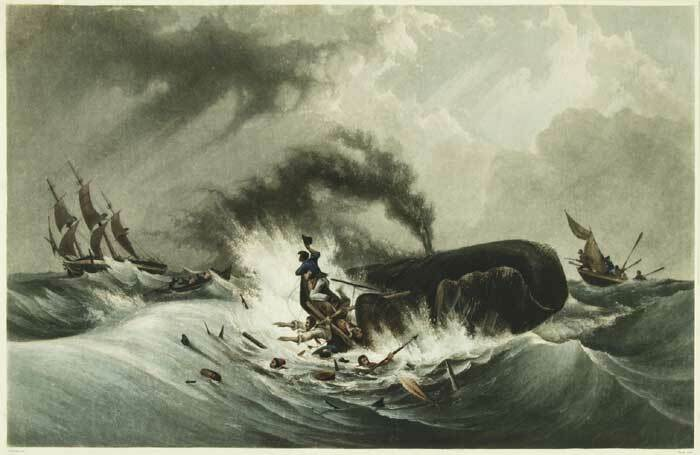 La Baleine